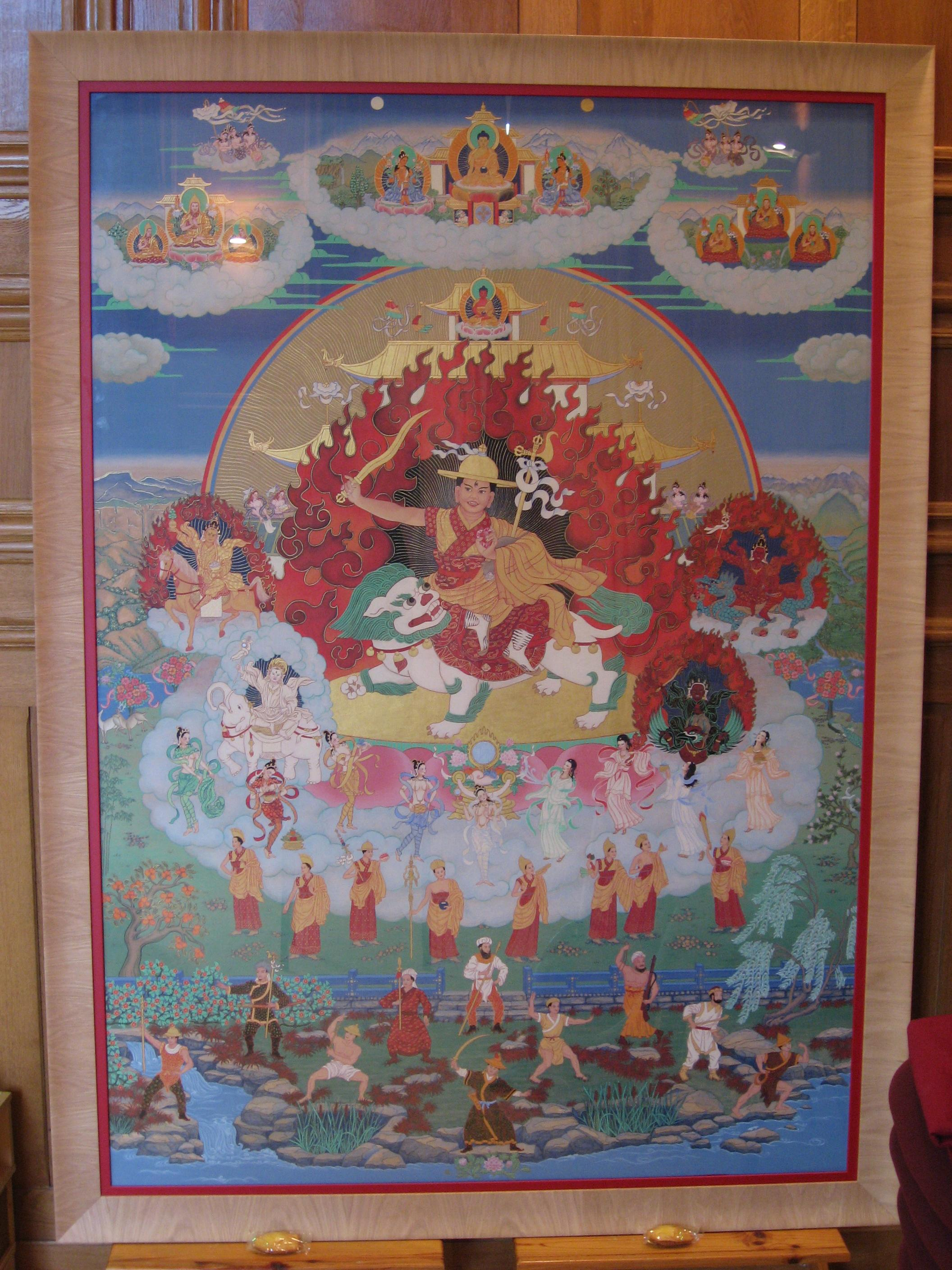 Thangka Bild der buddhistischen Gottheit Dorje Shugden im KMC France